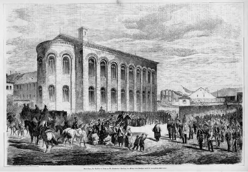 Konstantinbasilika Trier, Einweihungszeremoniells und Empfanges des Königs von Preußen durch die evangelische Geistlichkeit